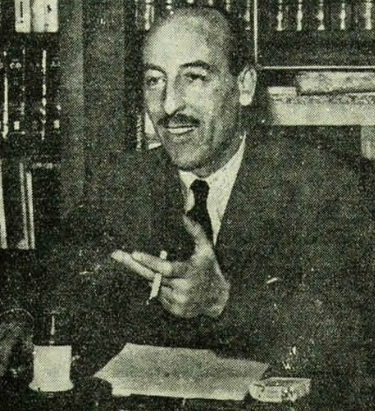 Valentino Bompiani